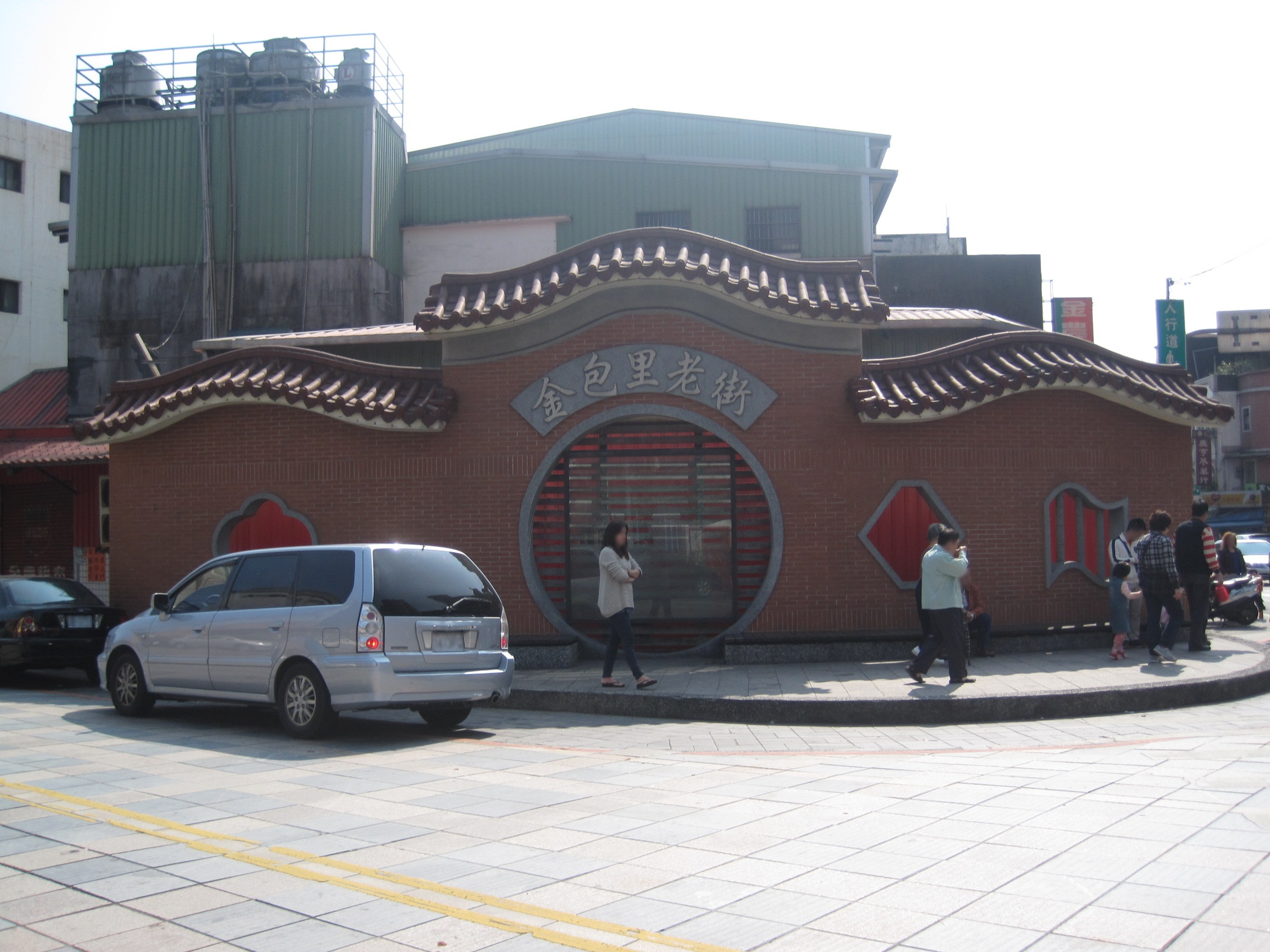 金山金包里老街造景